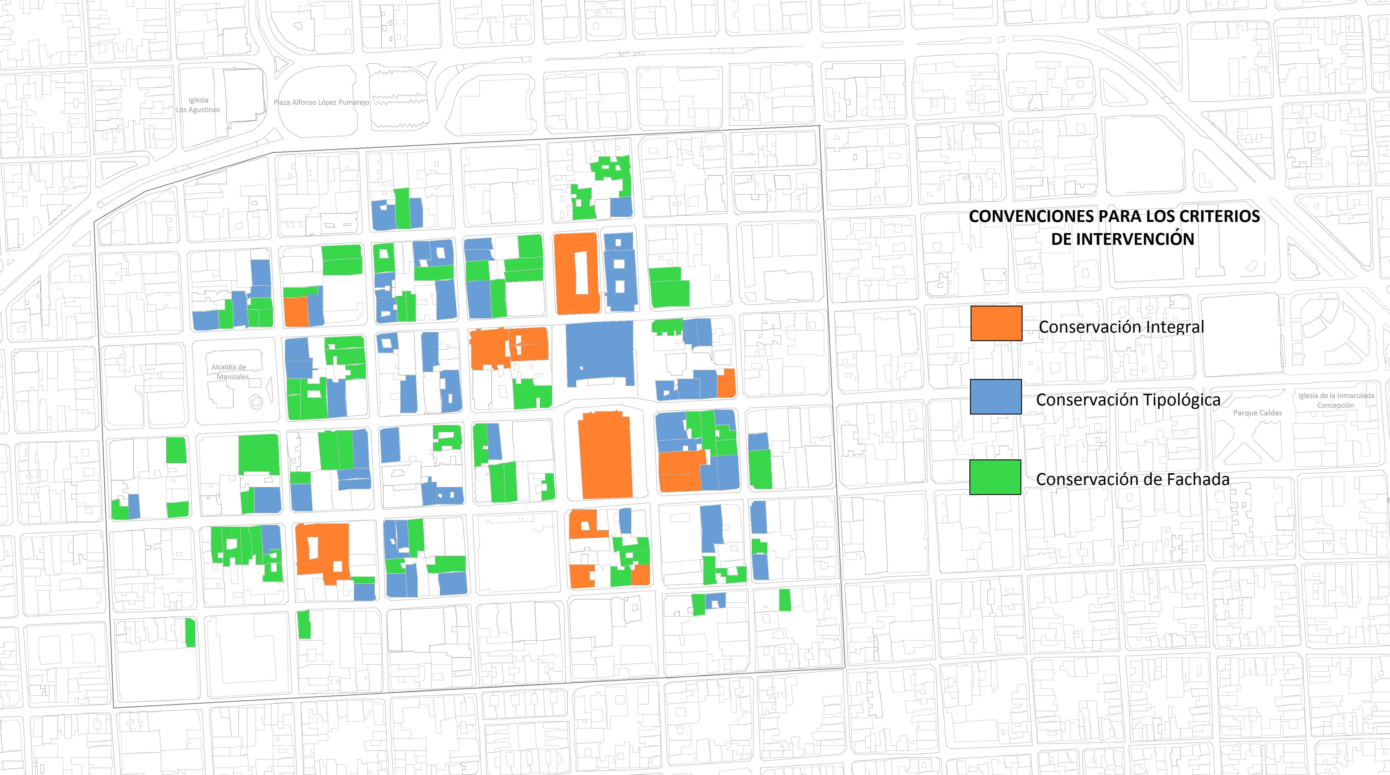 Mapa del centro histórico de Manizales, resaltando los inmuebles protegidos y los criterios de intervención de los mismos